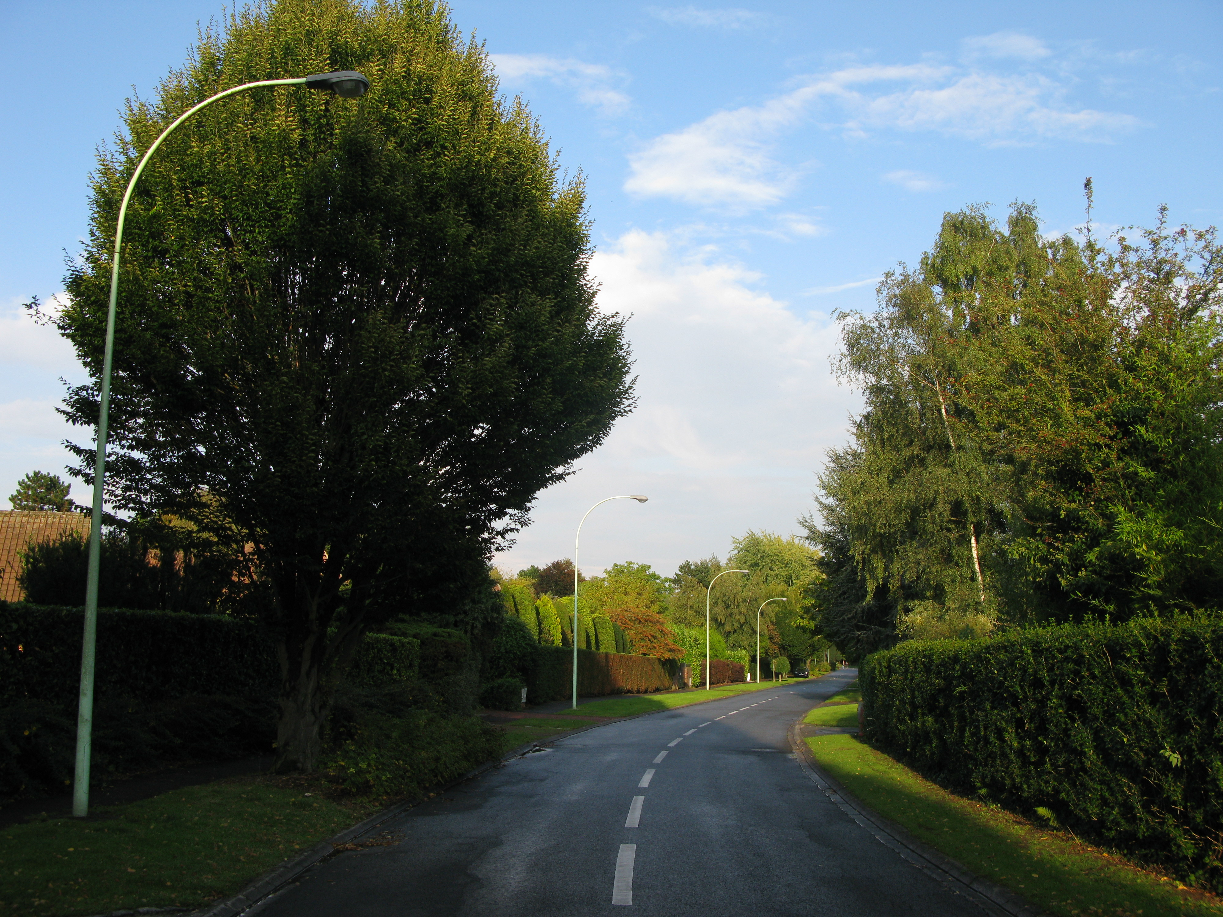 Avenue de Brigode à Villeneuve d'Ascq.